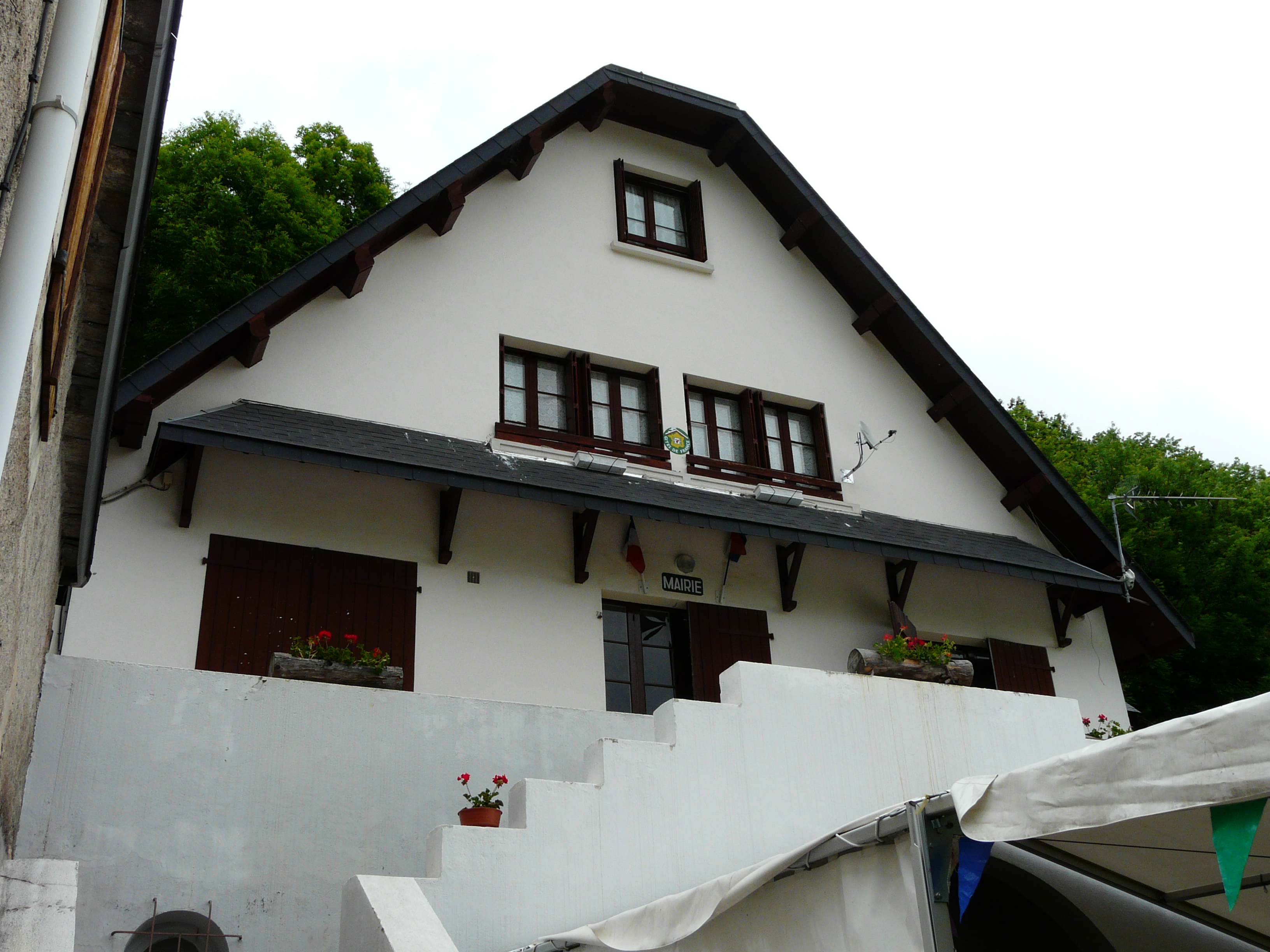 La mairie de Bourg-d'Oueil, Haute-Garonne, France.